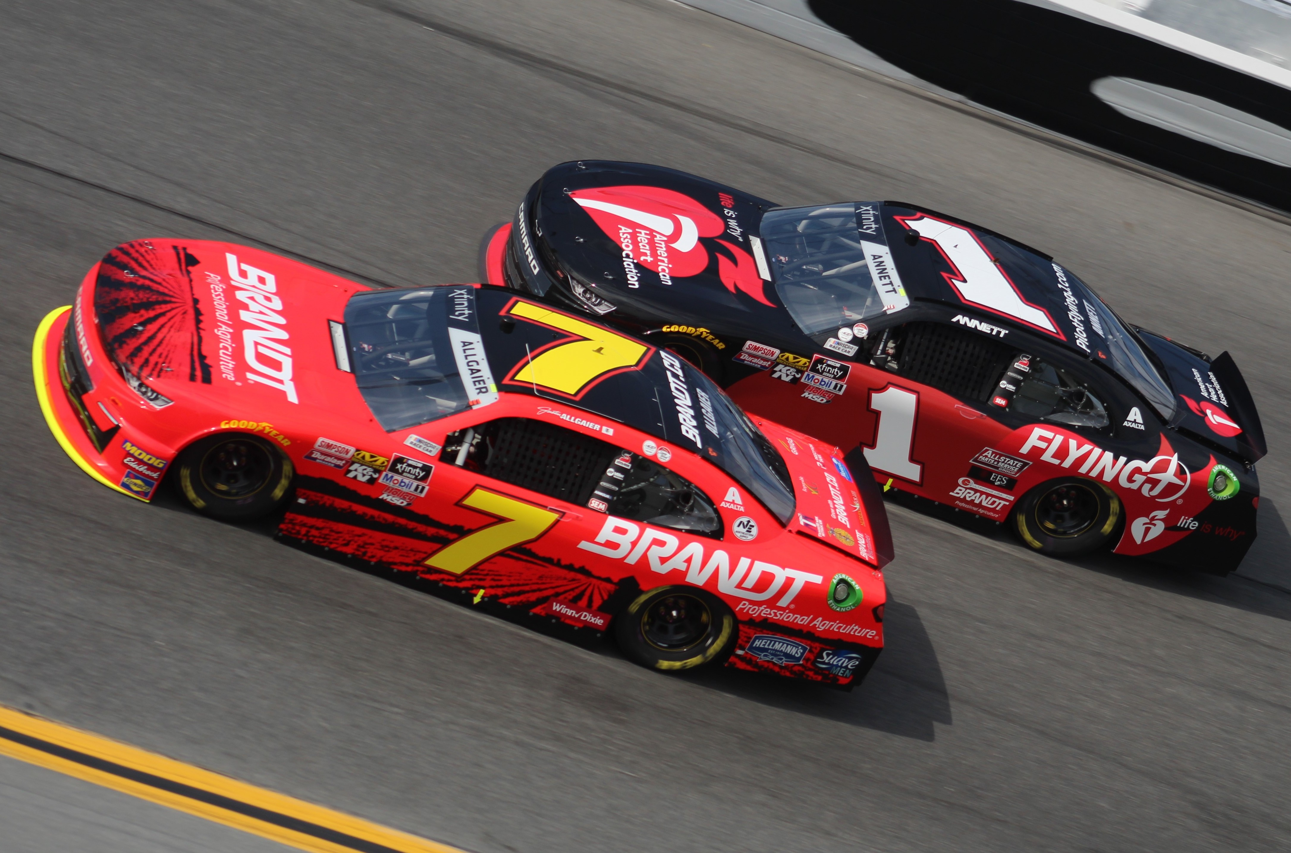 2019 Daytona 500